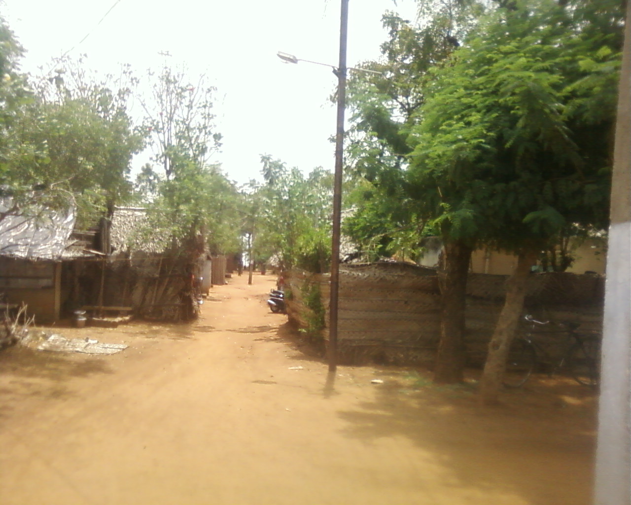 இந்தியாவில் இலங்கைத் தமிழர்கள் முகாம்